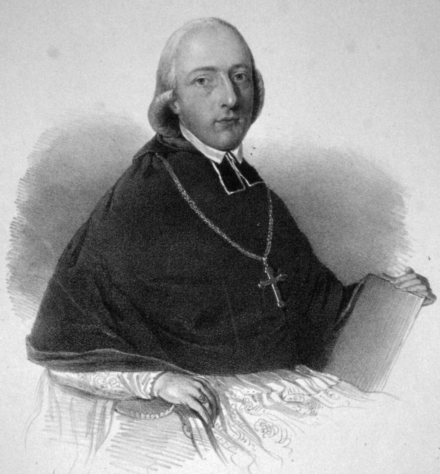 Maria Thadäus Trauttmansdorff, Lithographie von Faustin Herr